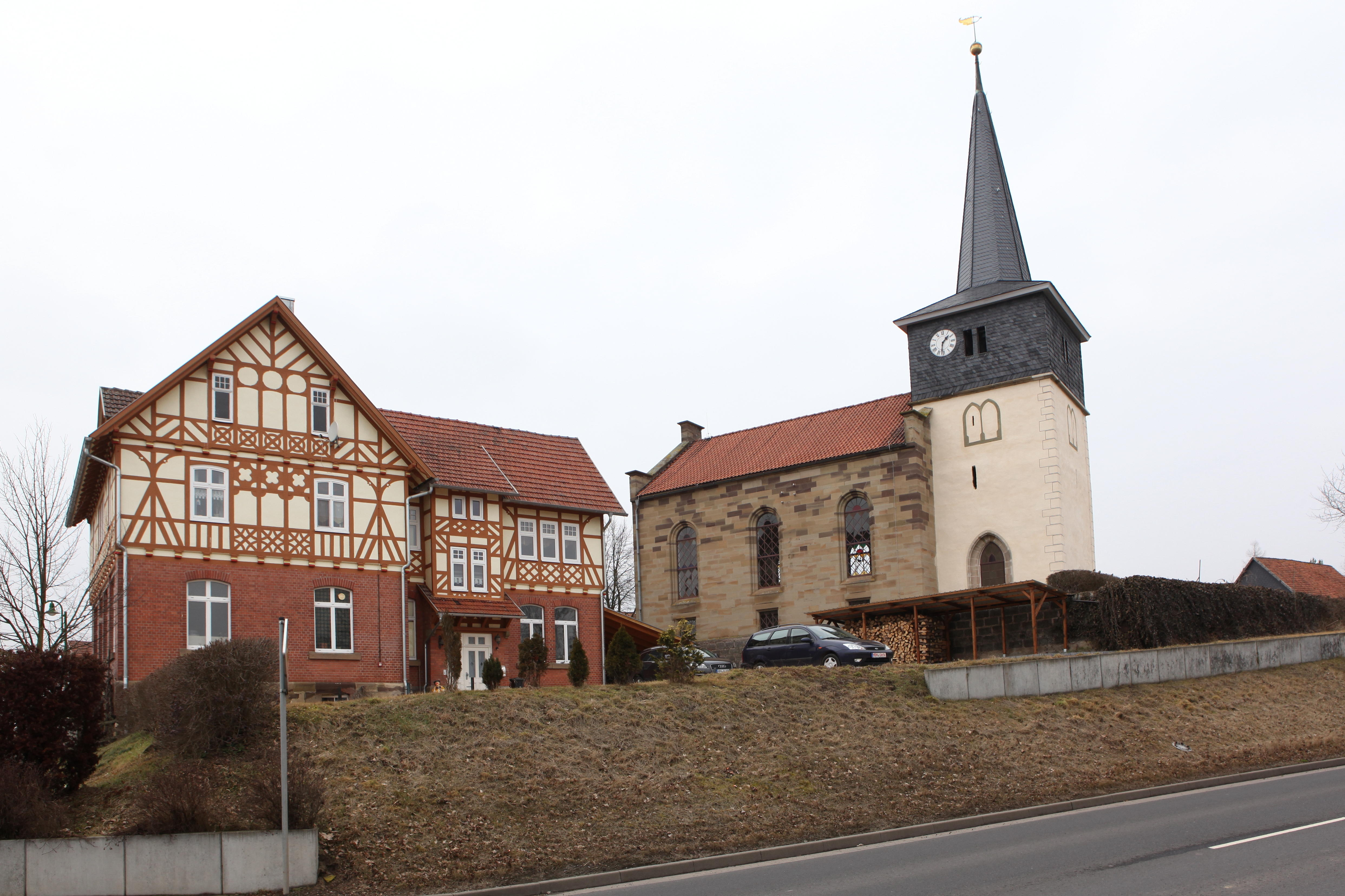 Marienkirche Simmershausen, OT von Gleichamberg, Landkreis Hildburghausen